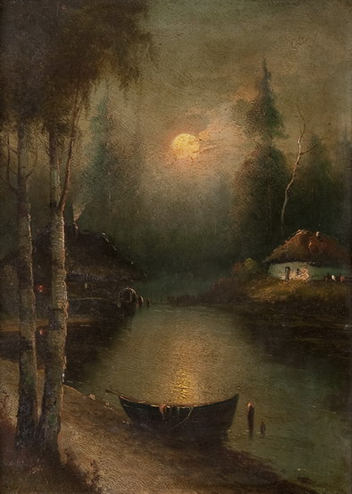 Н. В. Орлов (1863-1924) Лунный вечер 46х34 Дерево, масло